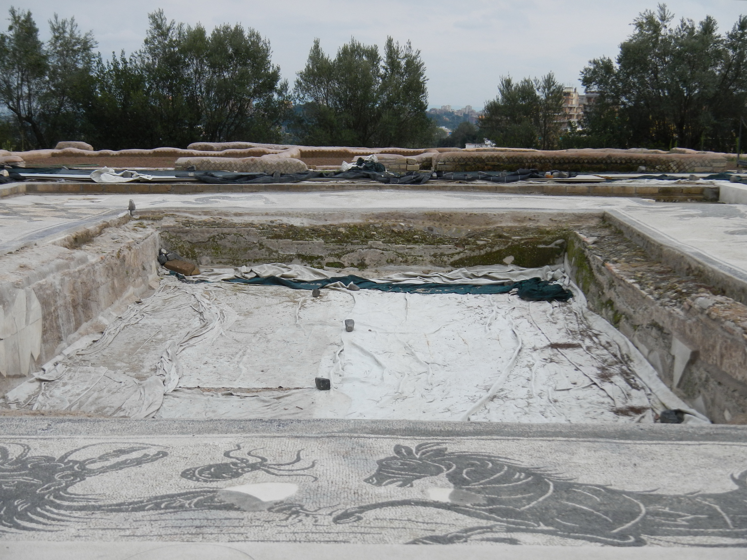 Piscina nell'area archeologica della Villa di Livia - Roma